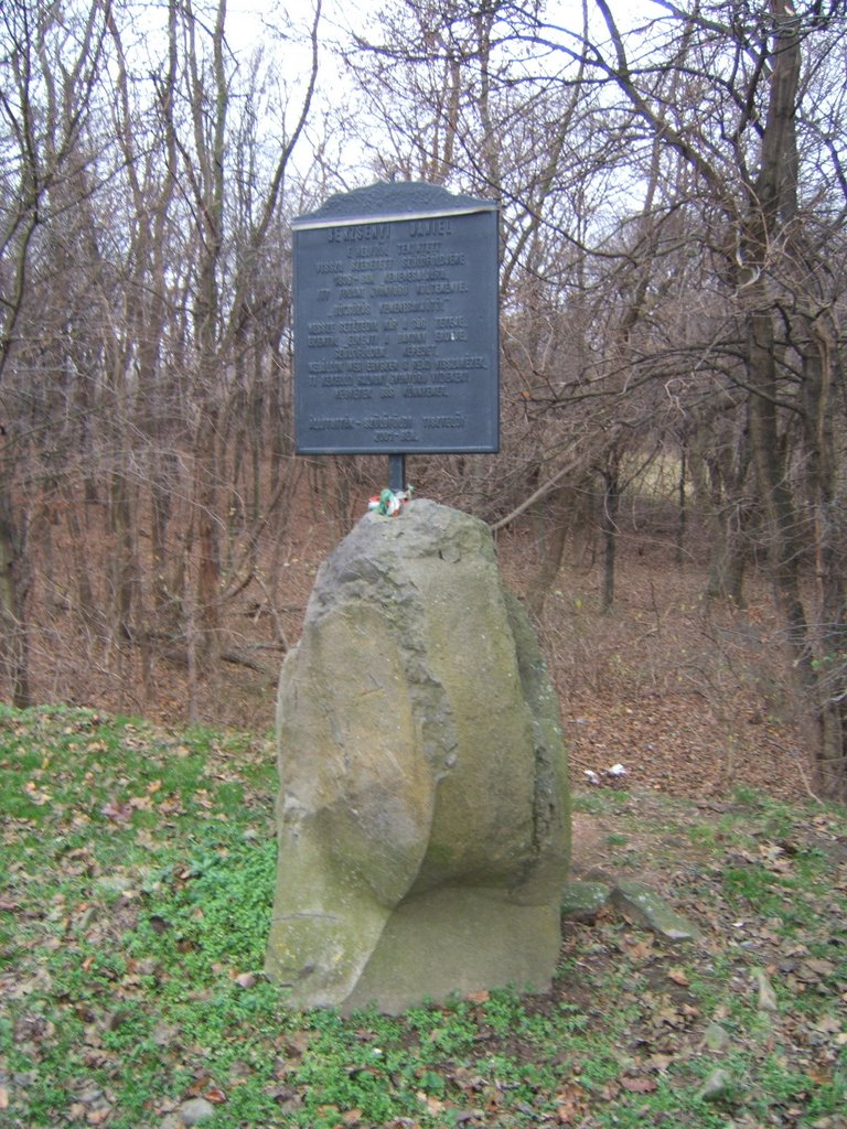 Berzsenyi Dániel-emléktábla Bazsiban